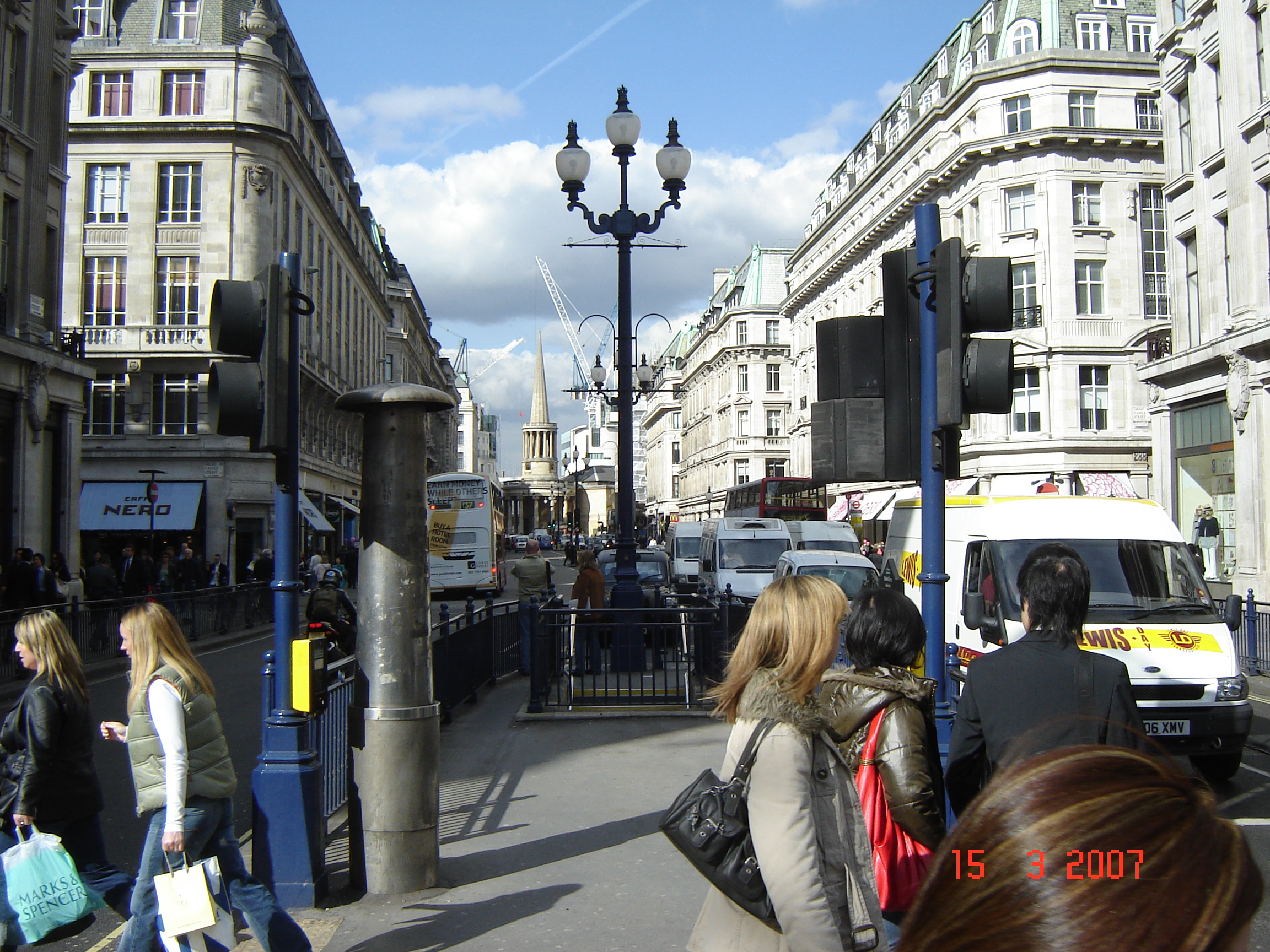 Regent Street, London